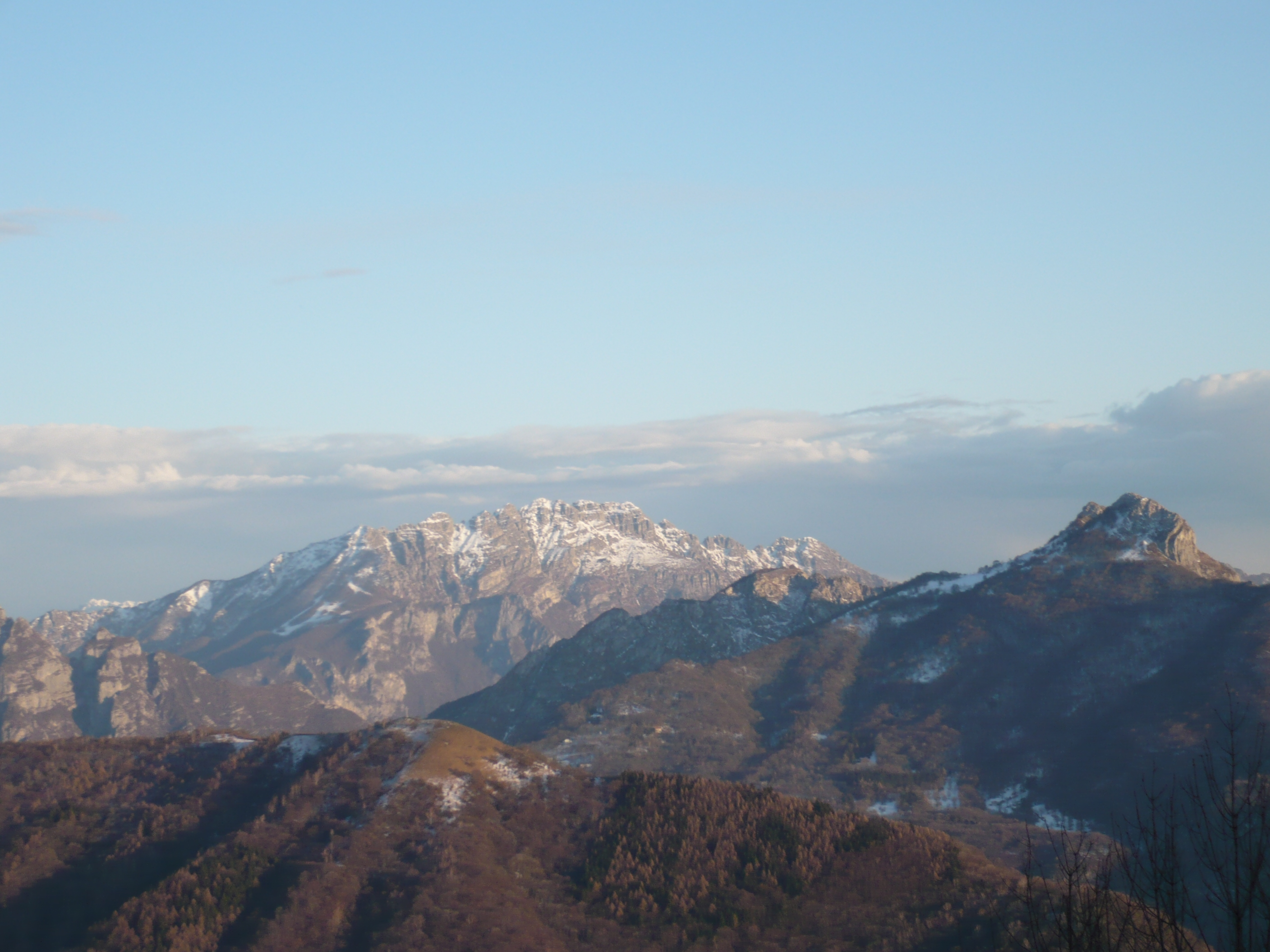 101 viste del Monte Resegone